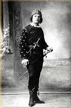 Franco Lo Giudice come Romeo in "Giulietta e Romeo" di Riccardo Zandonai